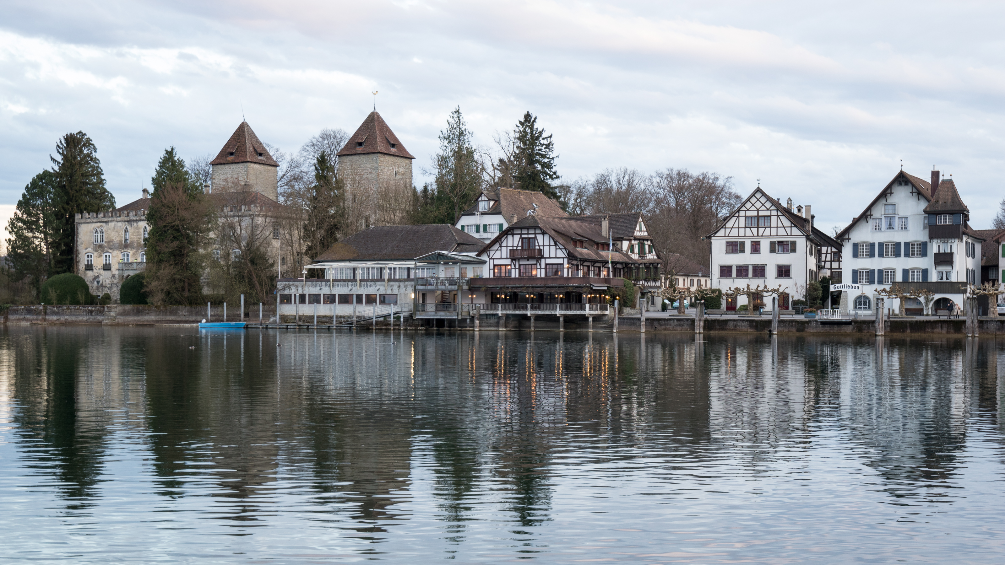 Blick auf Gottlieben vom gegenüberliegenden Rheinufer